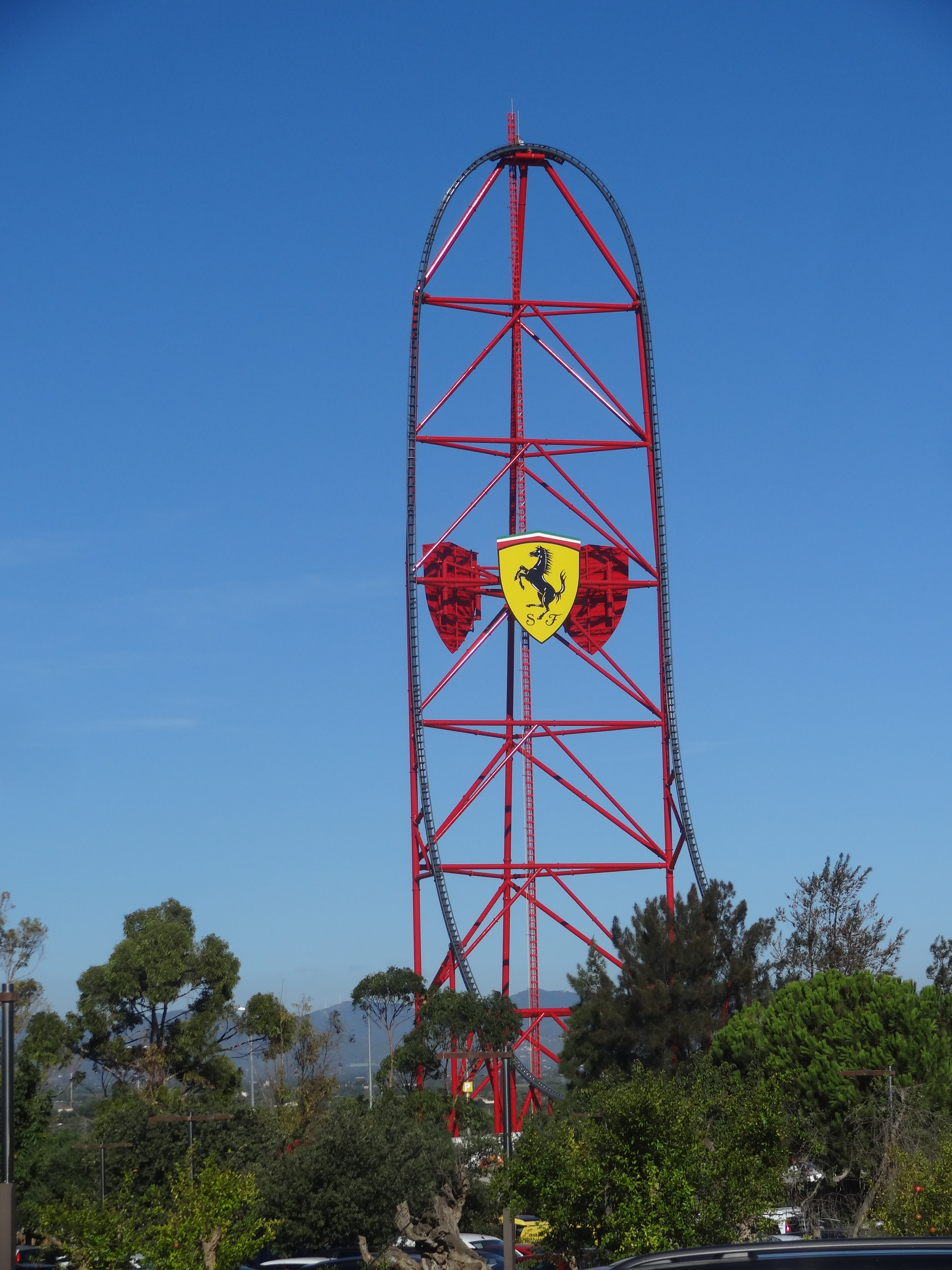 Vertical Accelerator